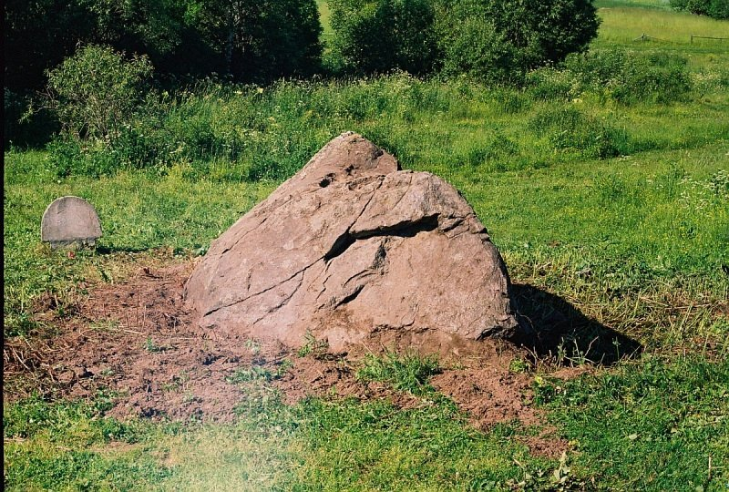 Полтараўшчына. Палтараўшчынскі вялікі камень